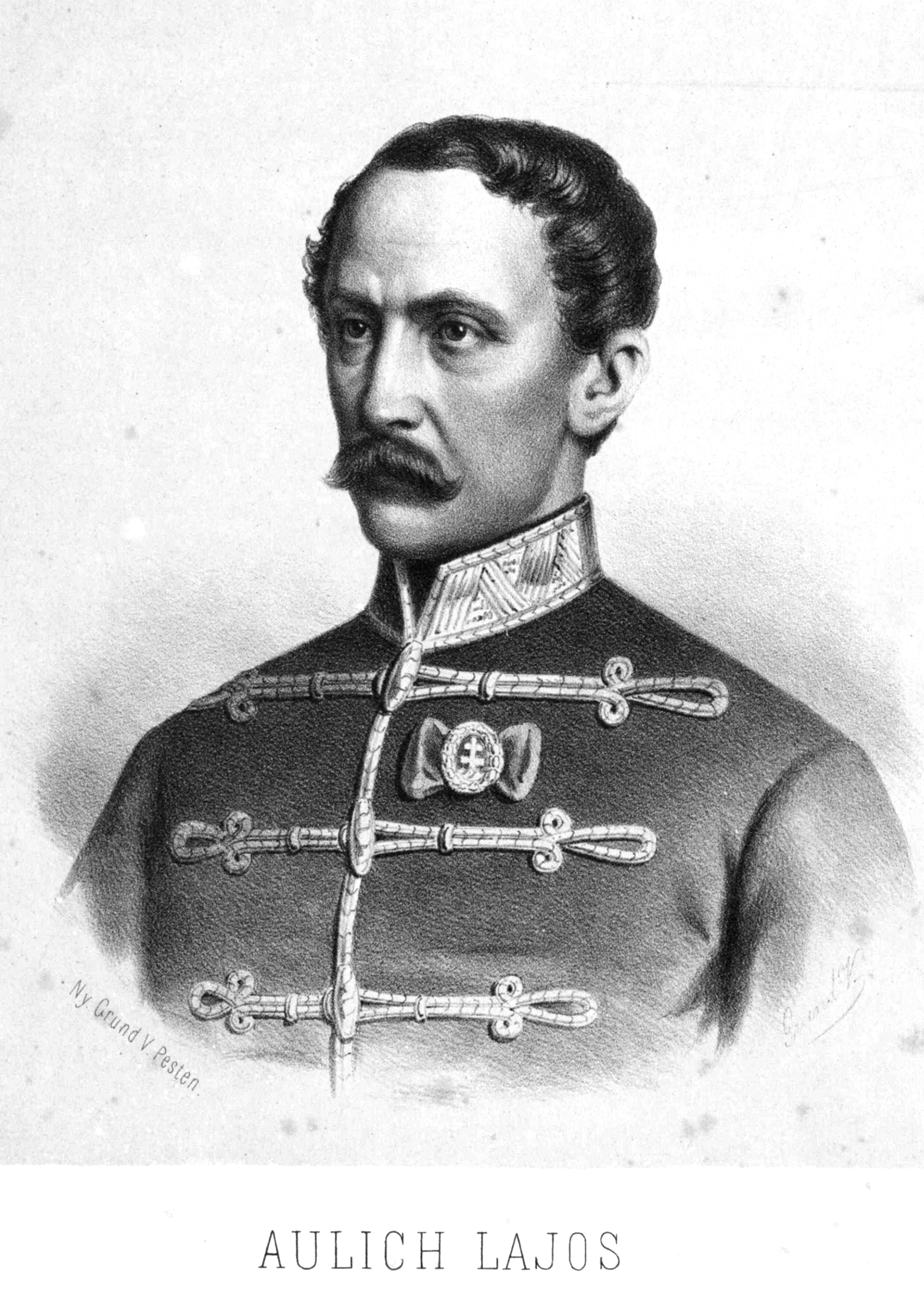 Aulich Lajos (1793–1849) honvéd vezérőrnagy, hadügyminiszter portréja